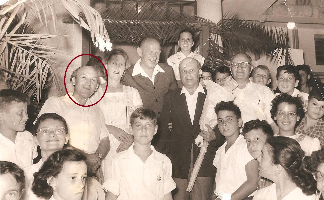 צבי הלוי בפגישה עם המשורר ש. שלום